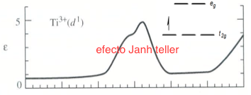 Distorsión por efecto Janh T.